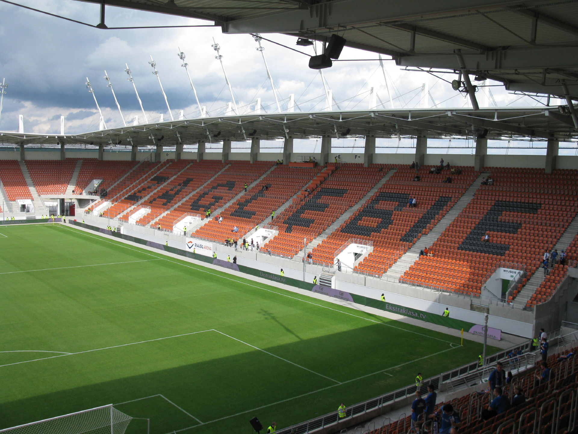 Dialog Arena przed Superpucharem Polski w 2009 r.